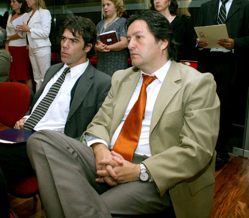 Asistencia del Diputado Tucapel Jimenez (Independiente) y Diputado Alvaro Escobar (Independiente) al lanzamiento del libro editado por la Biblioteca del Congreso Nacional de Chile (BCN) La masacre de la Escuela Santa María de Iquique 13 Diciembre 2007